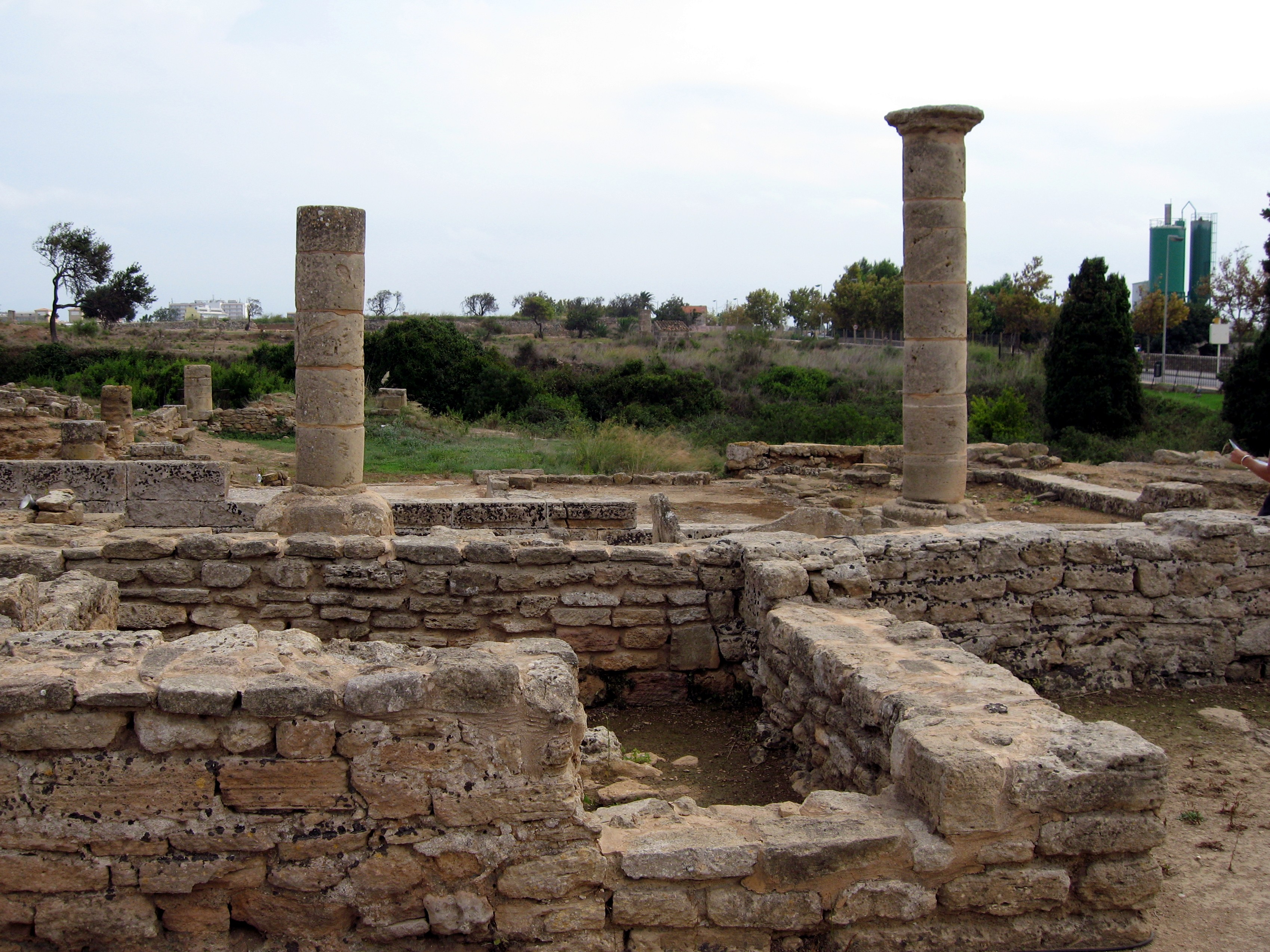 Pol·lèntia, Alcúdia, Mallorca, Spain